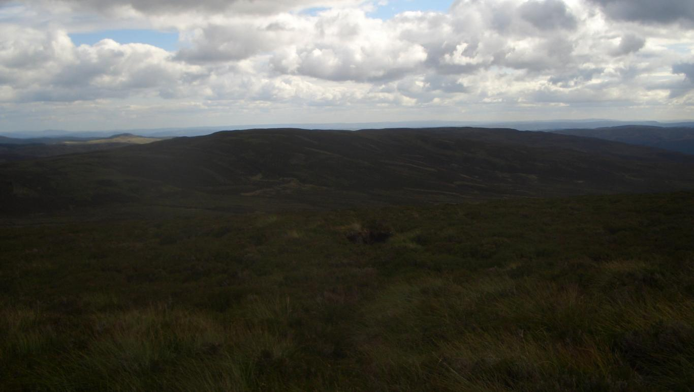 cefn gwyntog